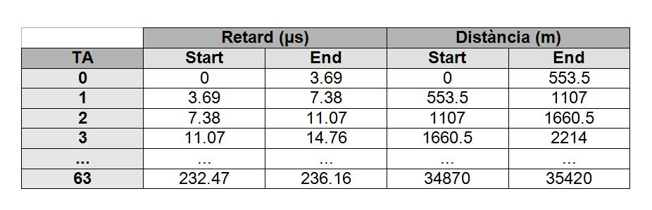 Taula on es mostra la relació del TA en funció de la distància i el retard.